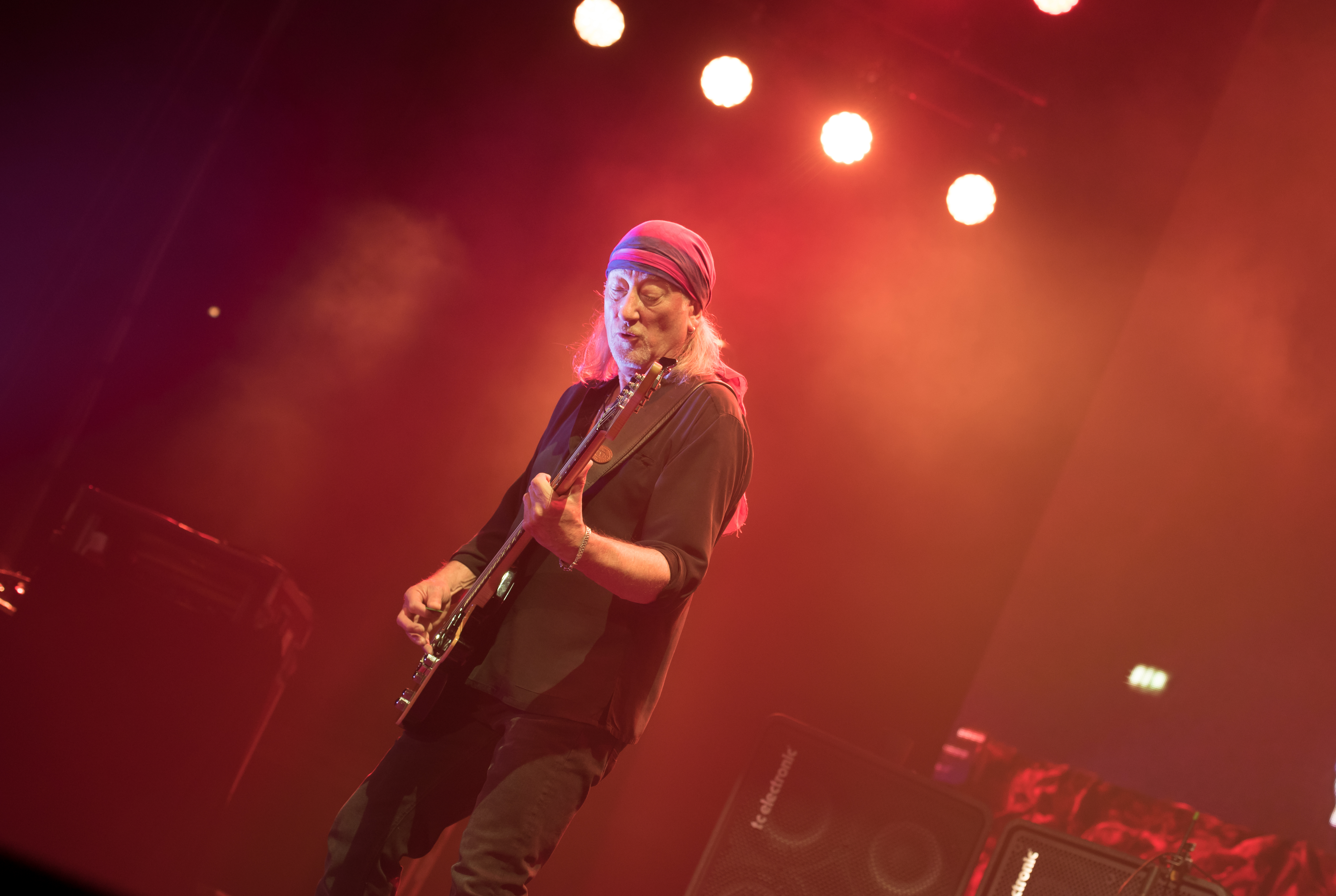 Roger Glover von Deep Purple bei der inFinite "The Long Goodbye Tour" in der Barclaycard Arena in Hamburg 2017